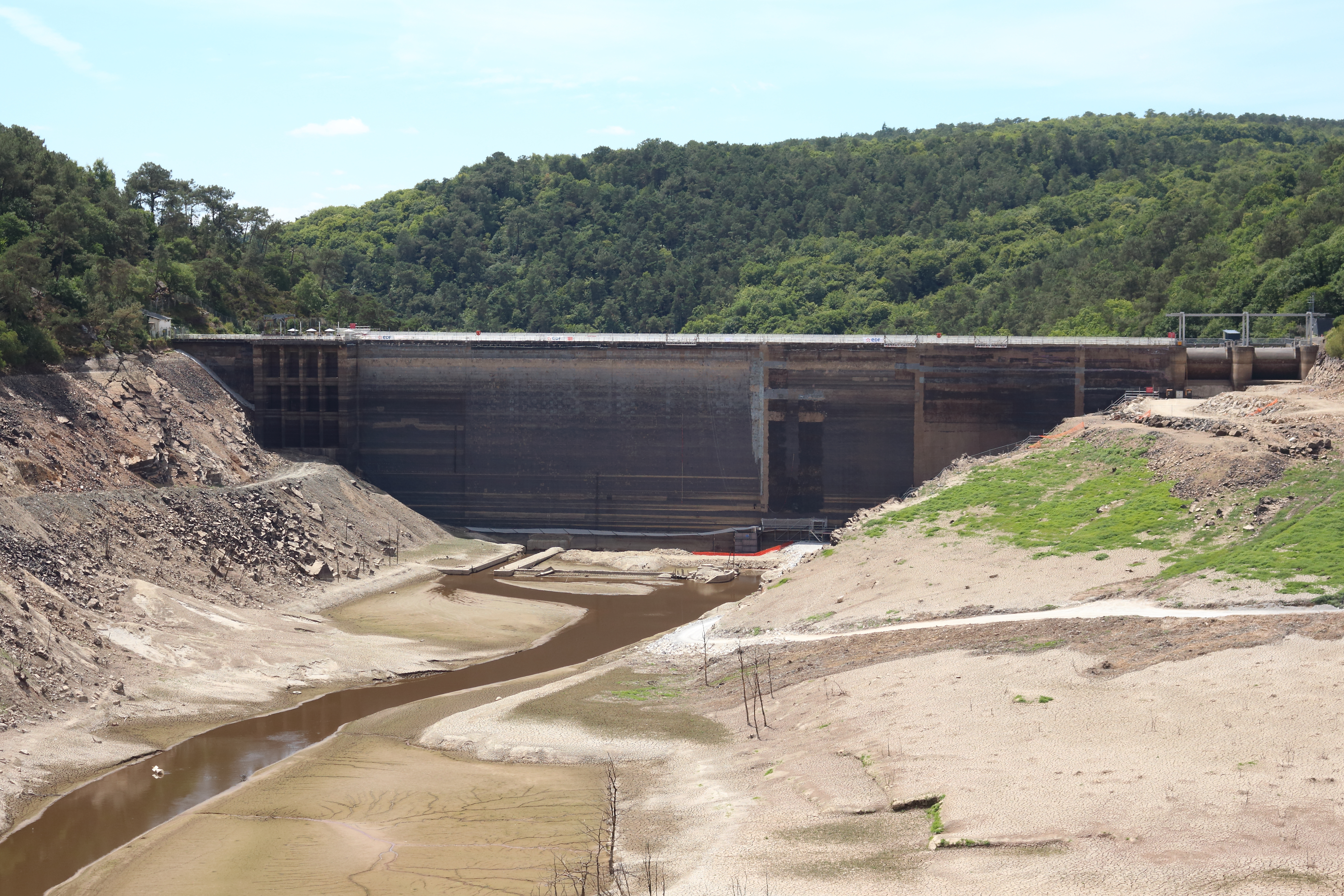 Vue du barrage de Guerlédan (côté intérieur) pendant l'assec en juin 2015. Communes de Mûr-de-Bretagne et de Saint-Aignan, Côtes-d'Armor et Morbihan, Bretagne, France.